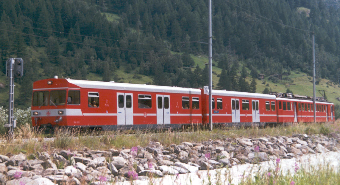 BDkt und BDk mit BDeh 6/6 als Shuttle von/nach Zermatt in Täsch